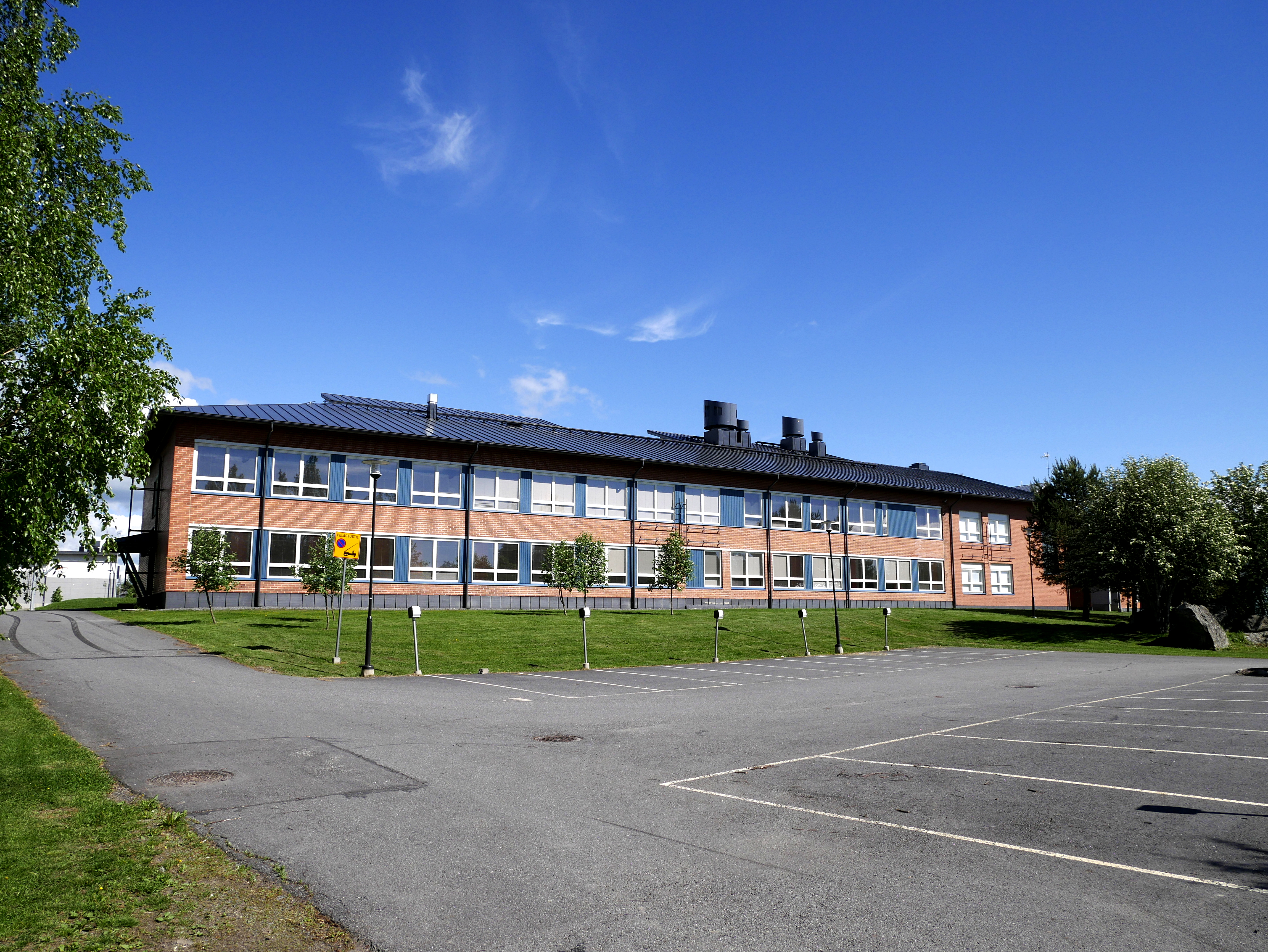 Savilahden yhtenäiskoulu Vähässäkyrössä.